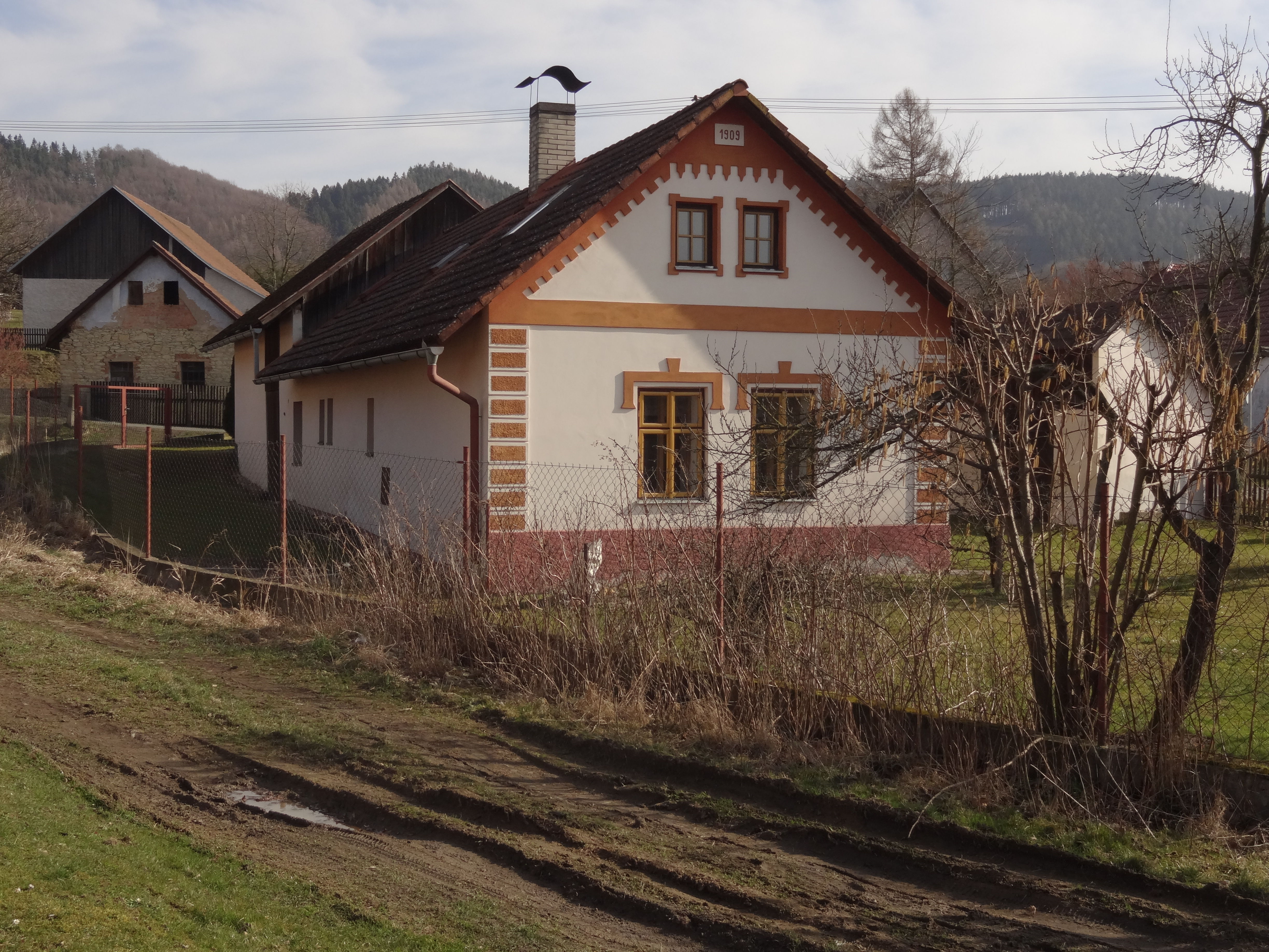 Jeřišno - lidová architektura čp. 35